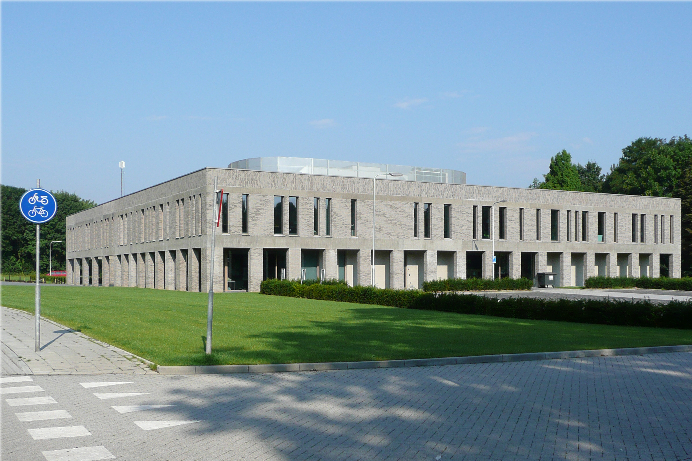 Het gemeentehuis van Stein, Limburg.